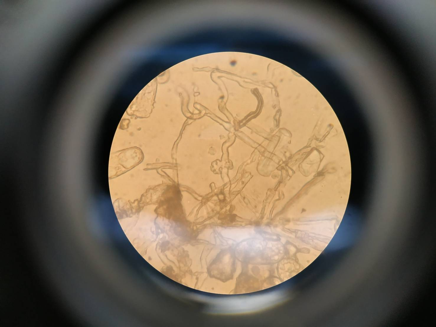 Erysiphe mori的附著器，呈瓣裂狀。